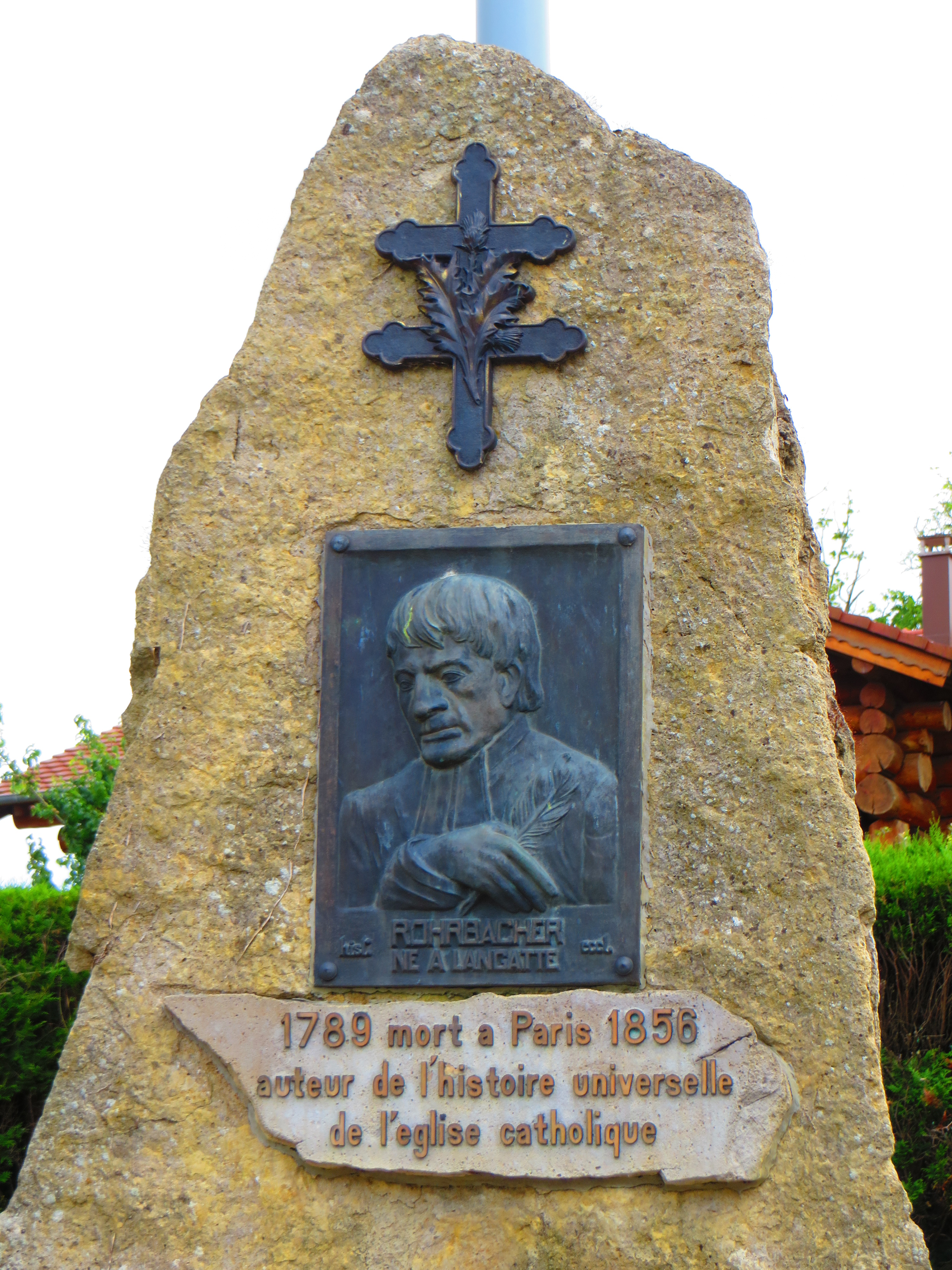 Langatte René François Rohrbacher